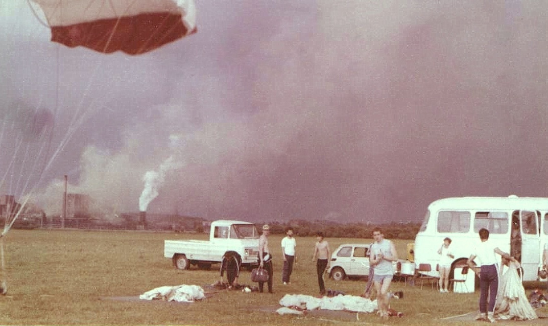 XVI Spadochronowe Mistrzostwa Śląska 1985. Mistrzostwa odbywały się przy nie najlepszej pogodzie. Na pierwszym planie Mariusz Bieniek (w krótkich spodenkach) - Sekcja Spadochronowa Aeroklubu Gliwickiego. W tle Kopalnia Węgla Kamiennego Gliwice